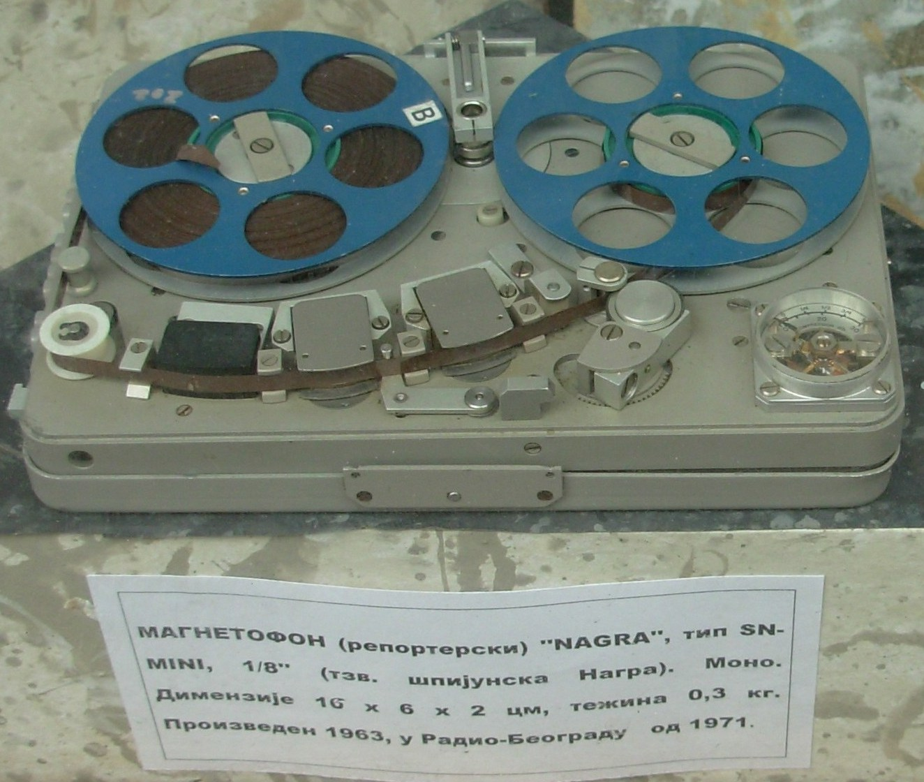 Magnetofon koji je bio u upotrebi u Radio Beogradu. Slikao Goldfinger Nagra SN-MINI (1963) — 1/8", mono.